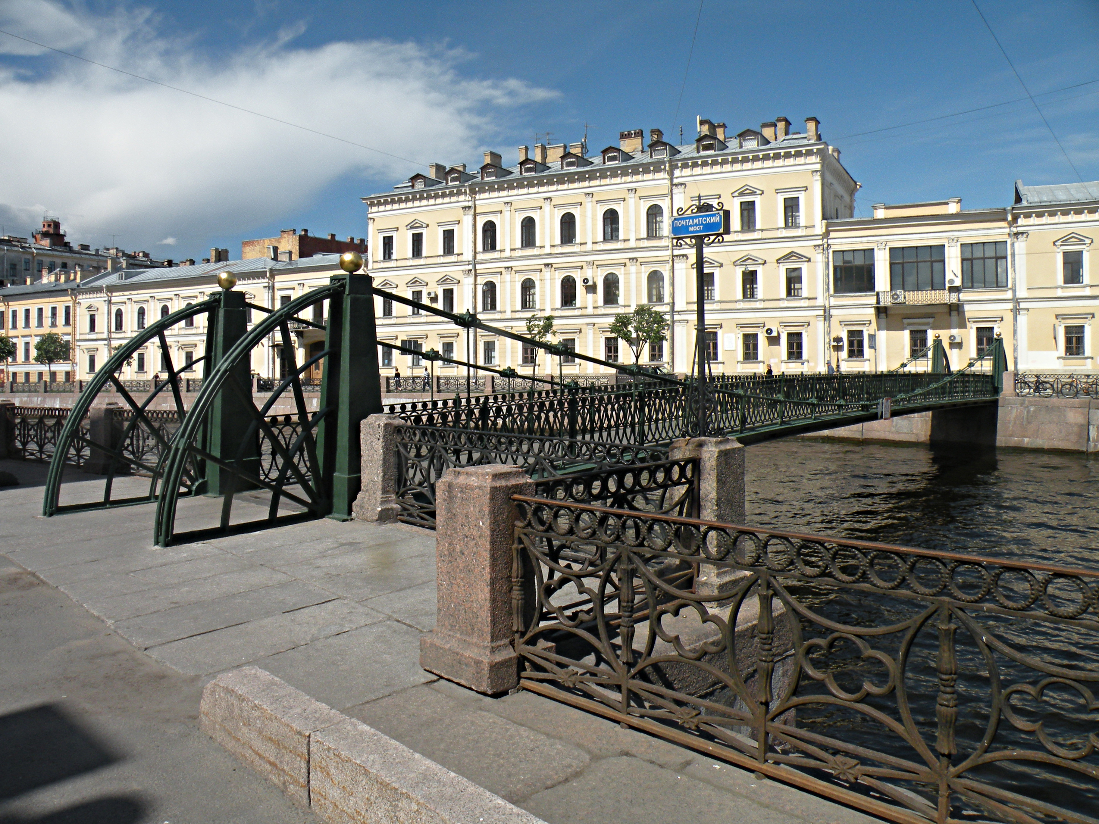 Треттер Вильгельм фон (1788-1859)Pochtamtsky Bridge in SPb